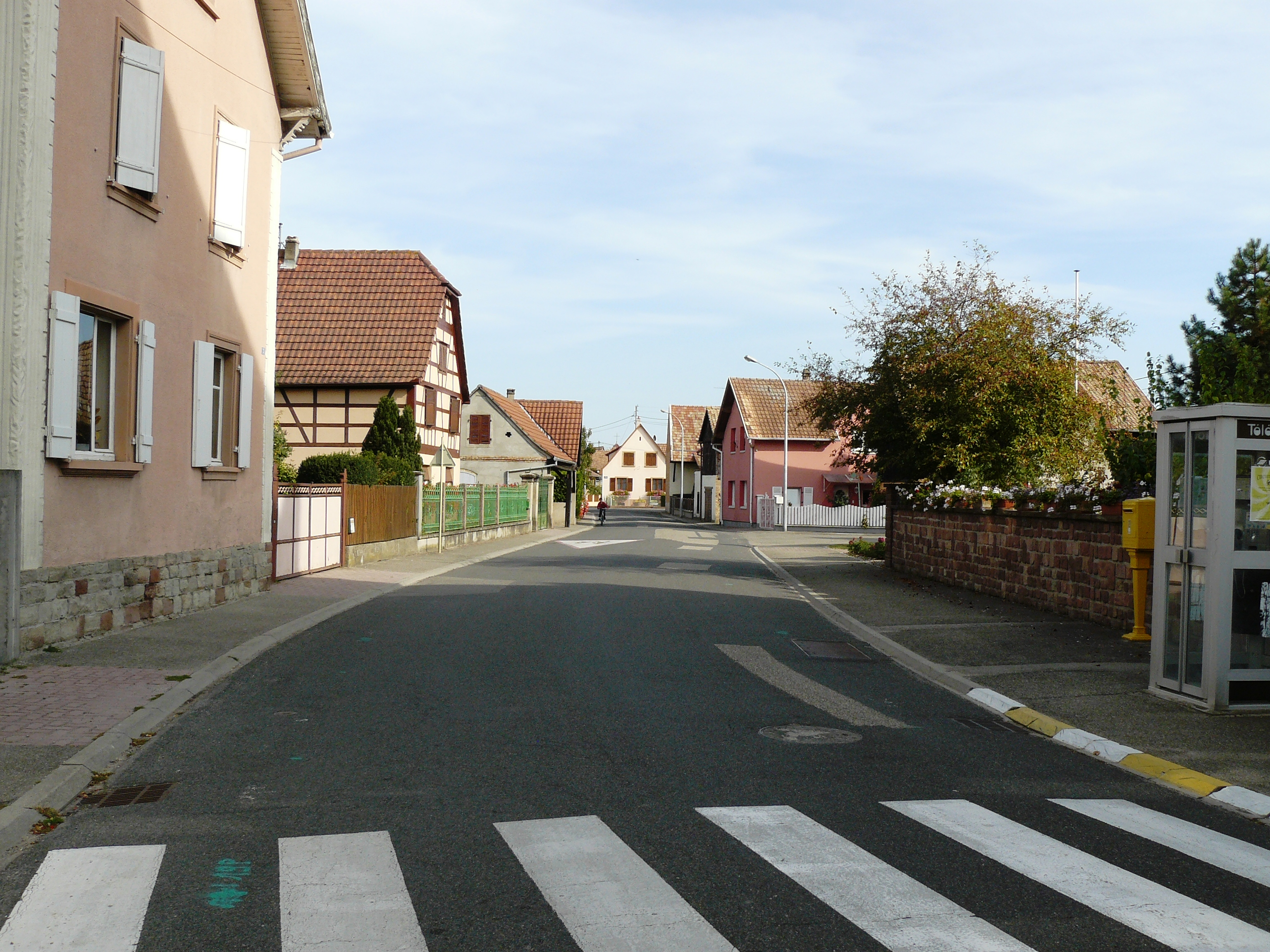 Village de Mackenheim (rue principale)